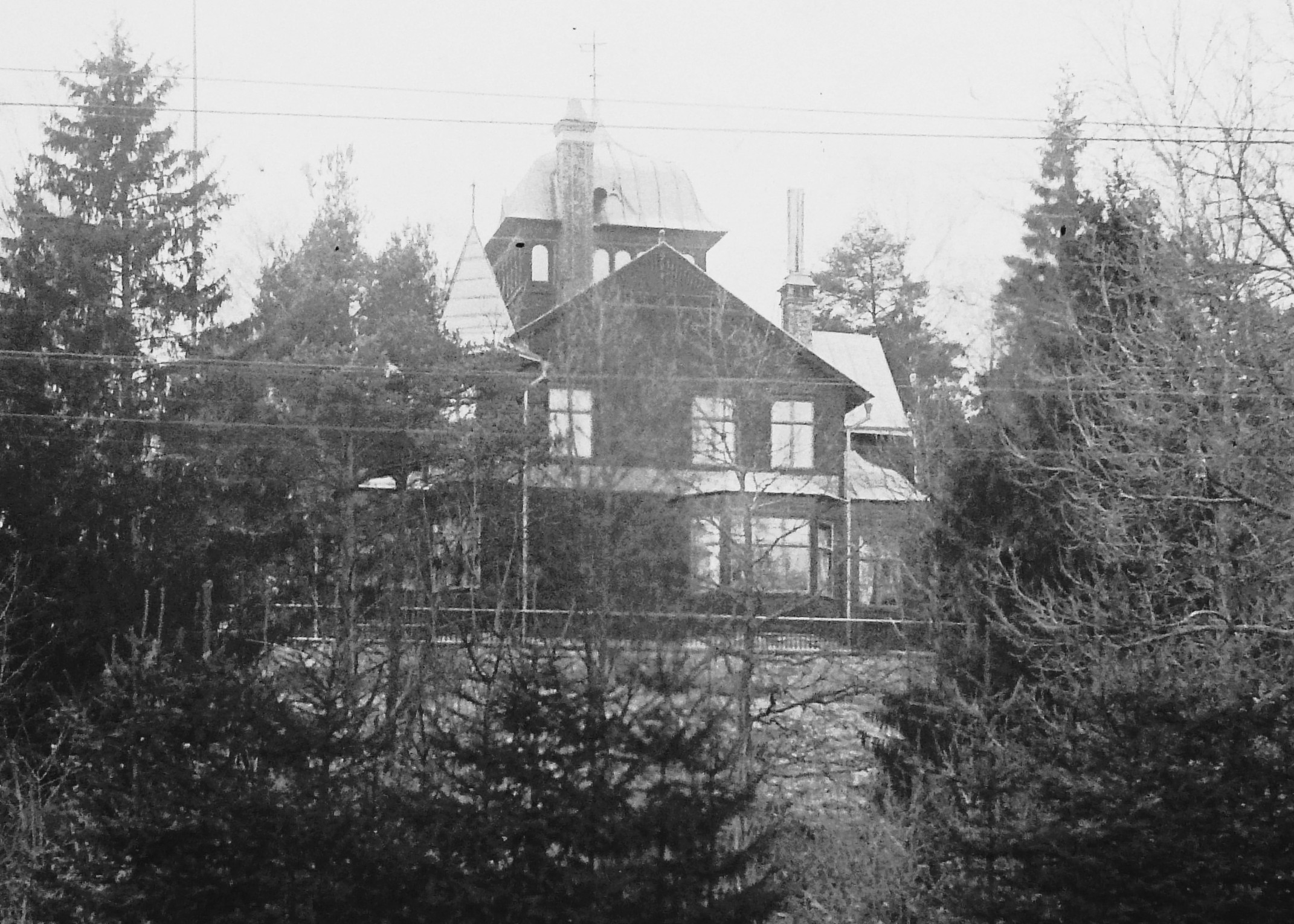 Grosshandlare Morris Gumperts villa, Tulevägen 12, arkitekt Fredrik Lilljekvist